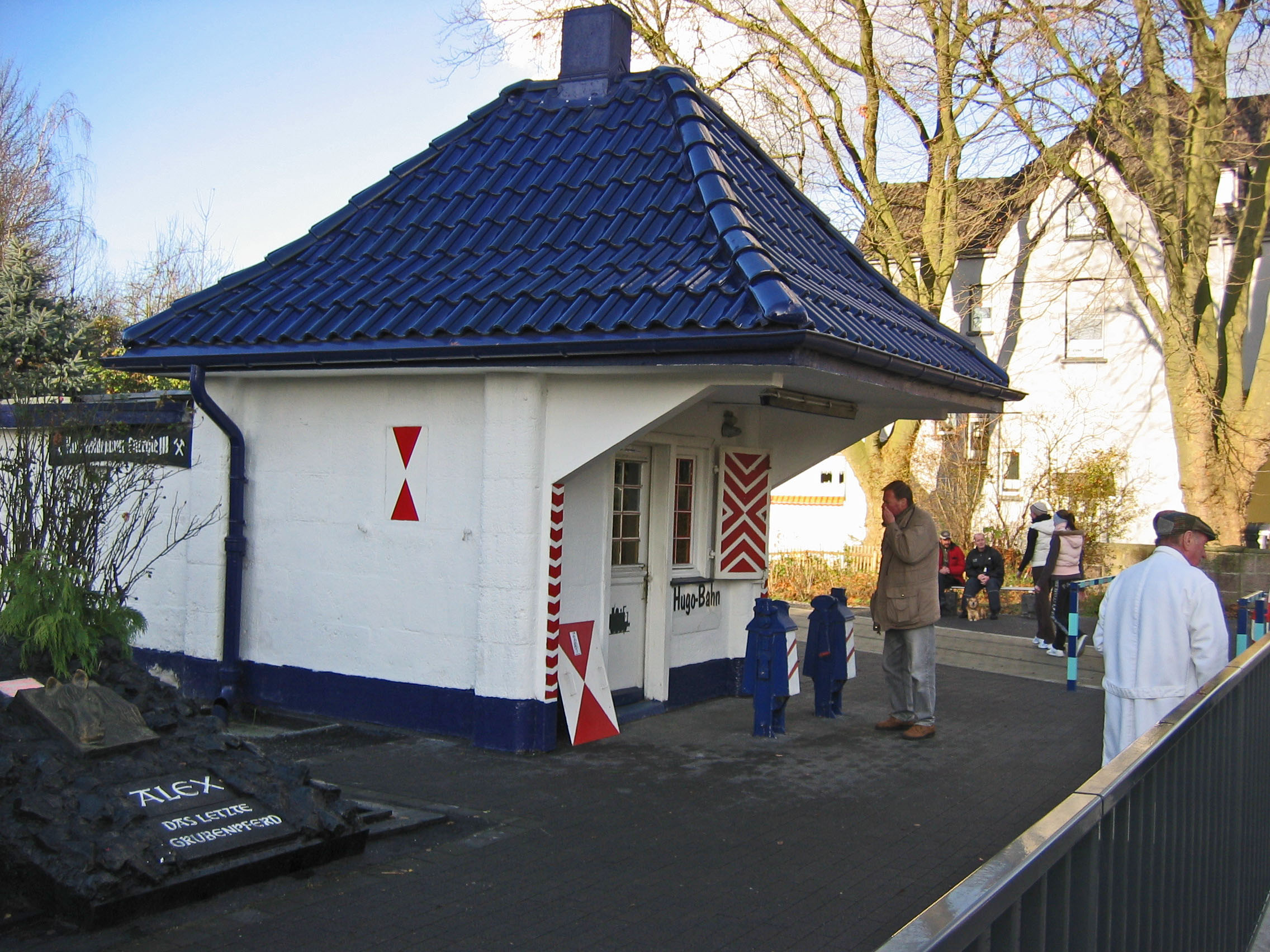 Ehemaliges Schrankenwärterhäuschen an der Hugo-Bahn